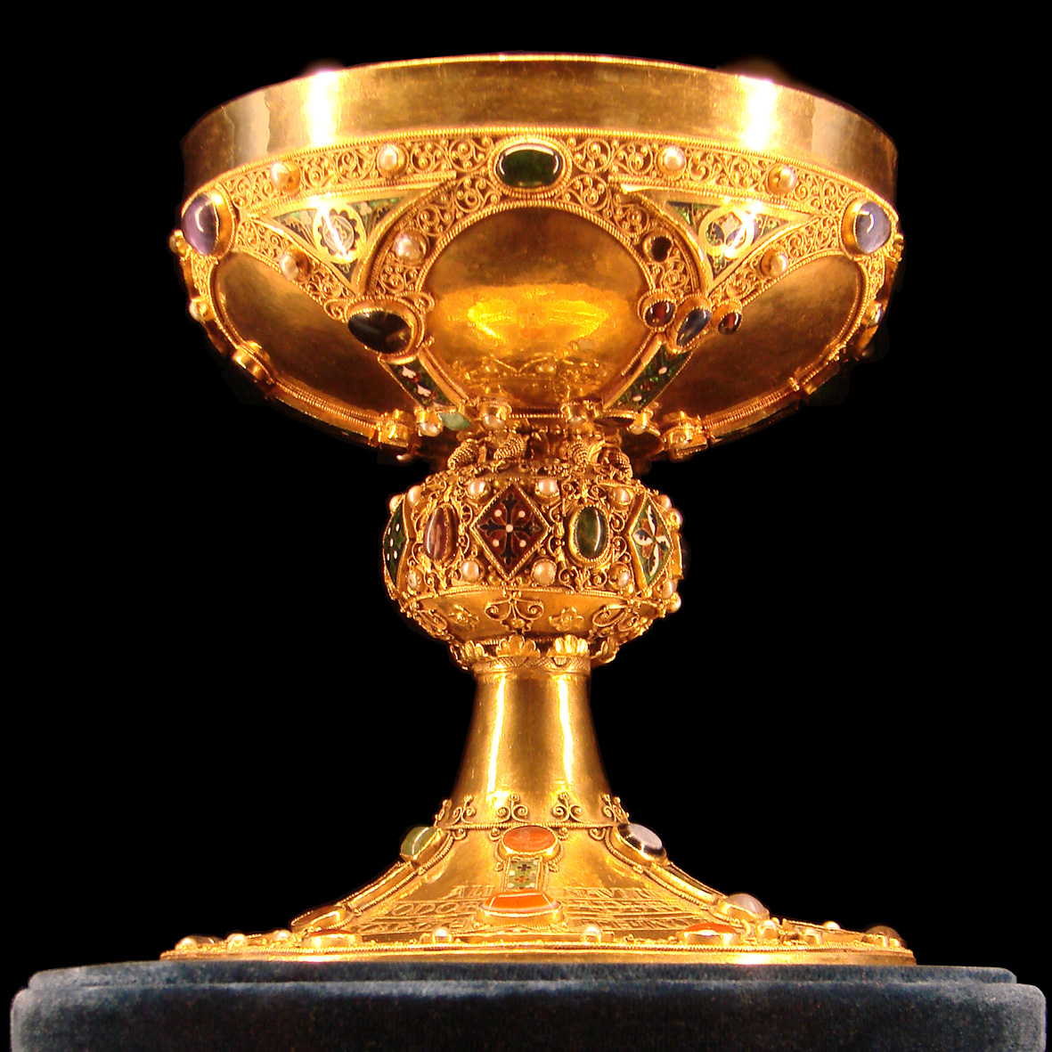 Calice du sacre,fin du XIIème siècle,Palais du Tau,Trésor de la cathédrale de Reims. Or, émaux, perles, pierres fines et pierres précieuses. Il fut envoyé à la fonte à la Monnaie de Paris et heureusement oublié, puis exposé au Musée des Antiques de la Bibliothèque Nationale à Paris. Il fut renvoyé à Reims en 1861, sous Napoléon III.